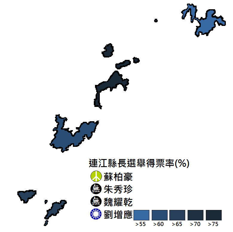 連江縣長選舉得票分布。